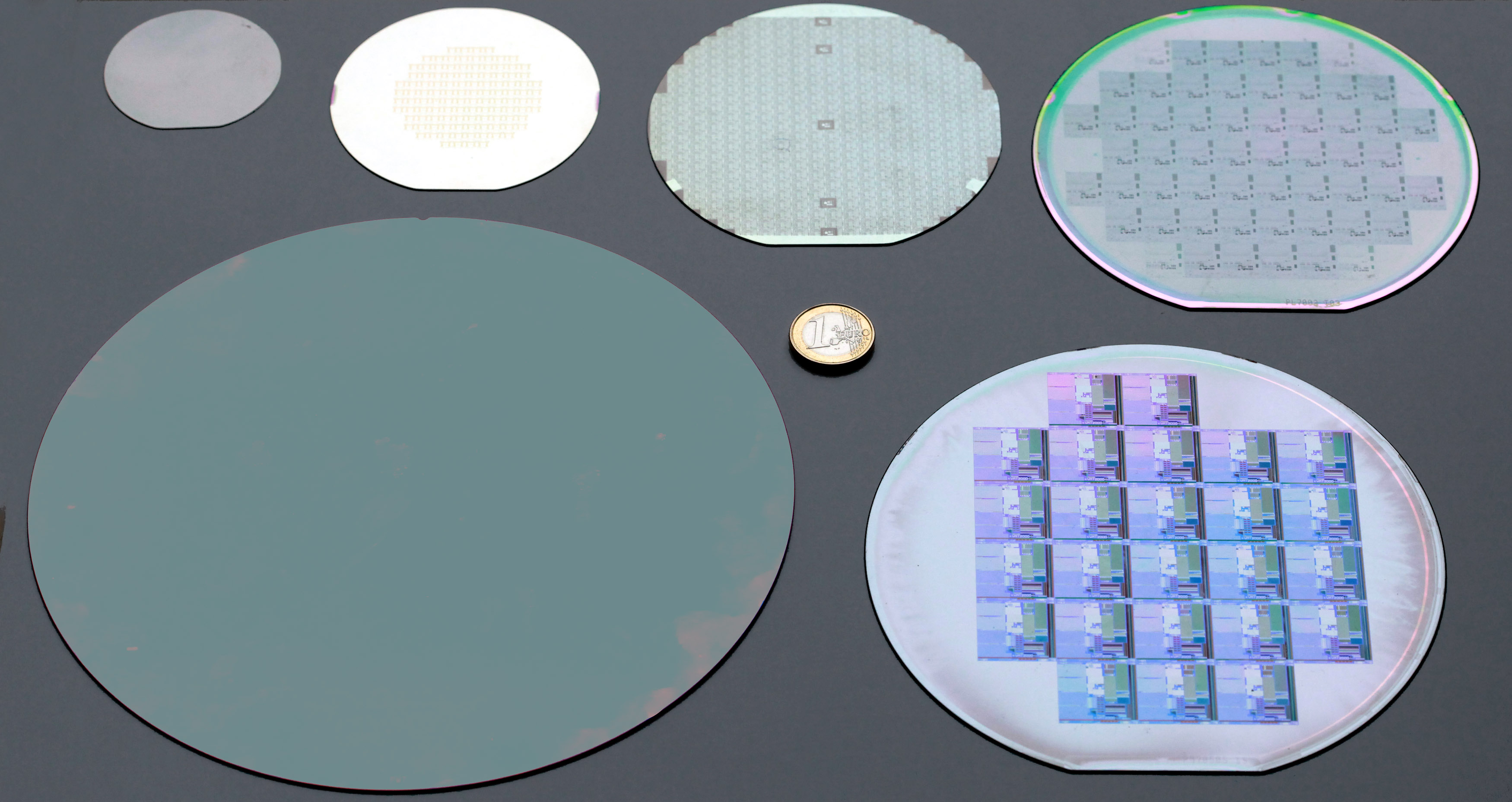 Verschiedene Silizium-Wafer in den Größen von 2-Zoll (oben links), 3-Zoll, 4-Zoll, 5-Zoll (oben rechts), 150 mm und 200 mm (unten links). Im Vergleich dazu eine 1-Euro-Münze in der Bildmitte.